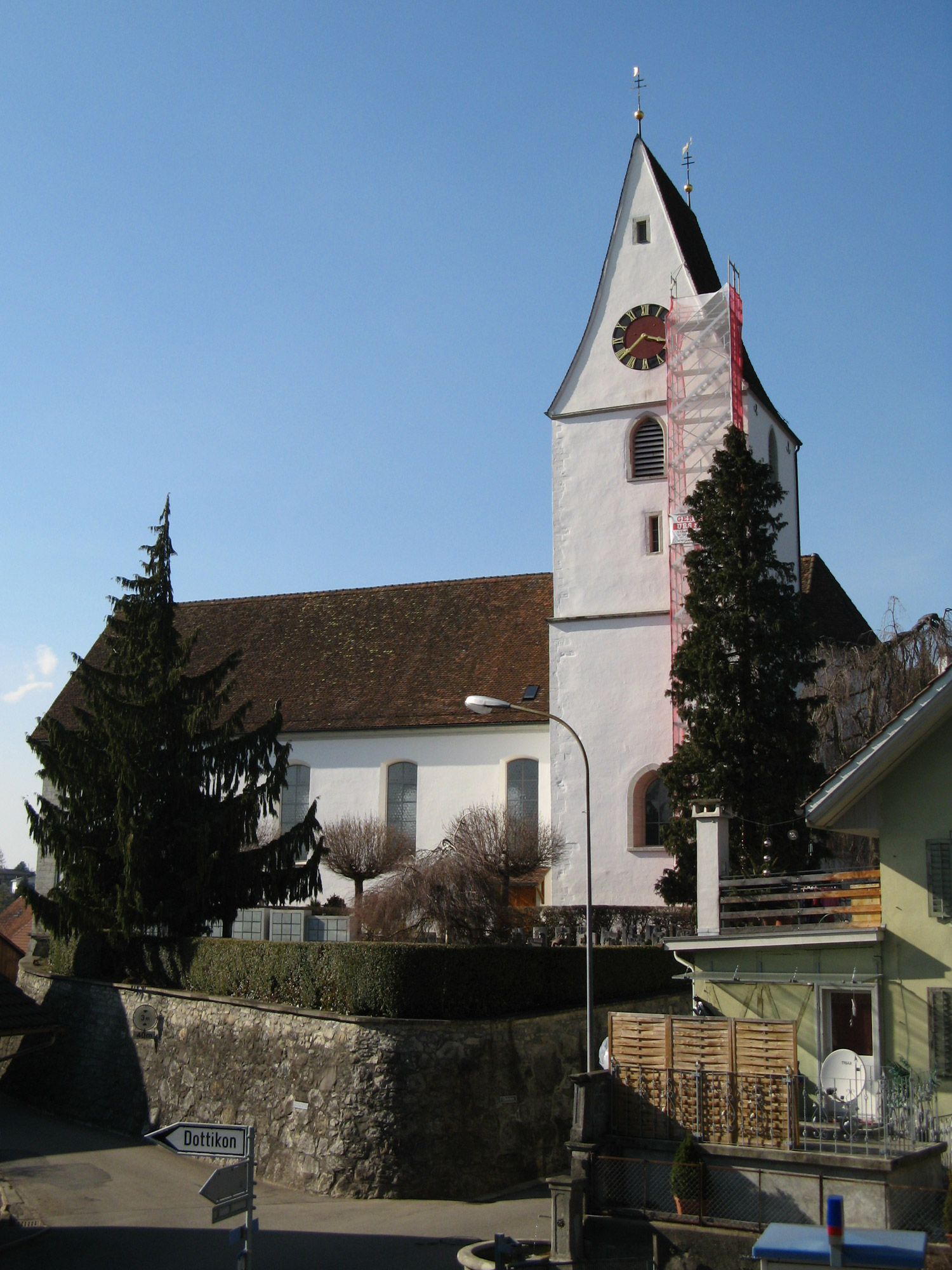 Römisch-katholisch Pfarrkirche St. Michael in Hägglingen